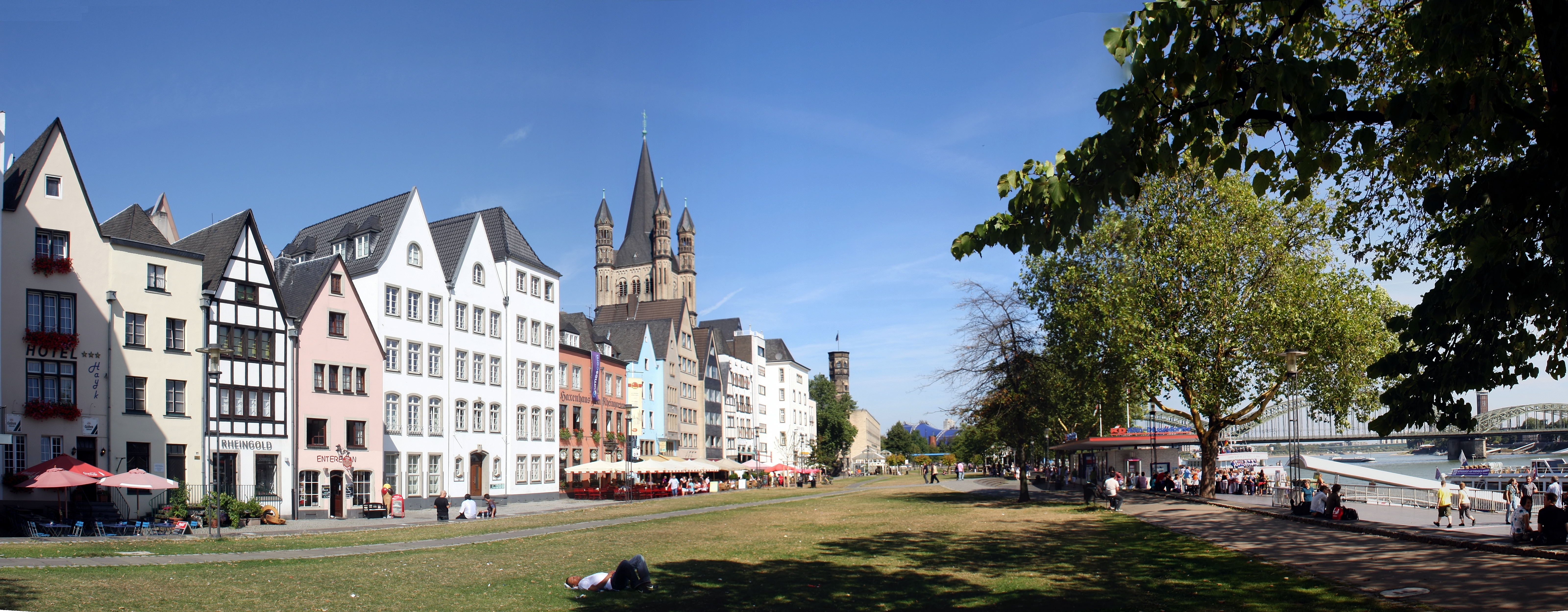 Köln: Rheingarten an der Straße Frankenwerft in Blickrichtung Hohenzollernbrücke. Im Hintergrund Groß St. Martin. Unterhalb des Rasens verläuft der Rheinufertunnel.